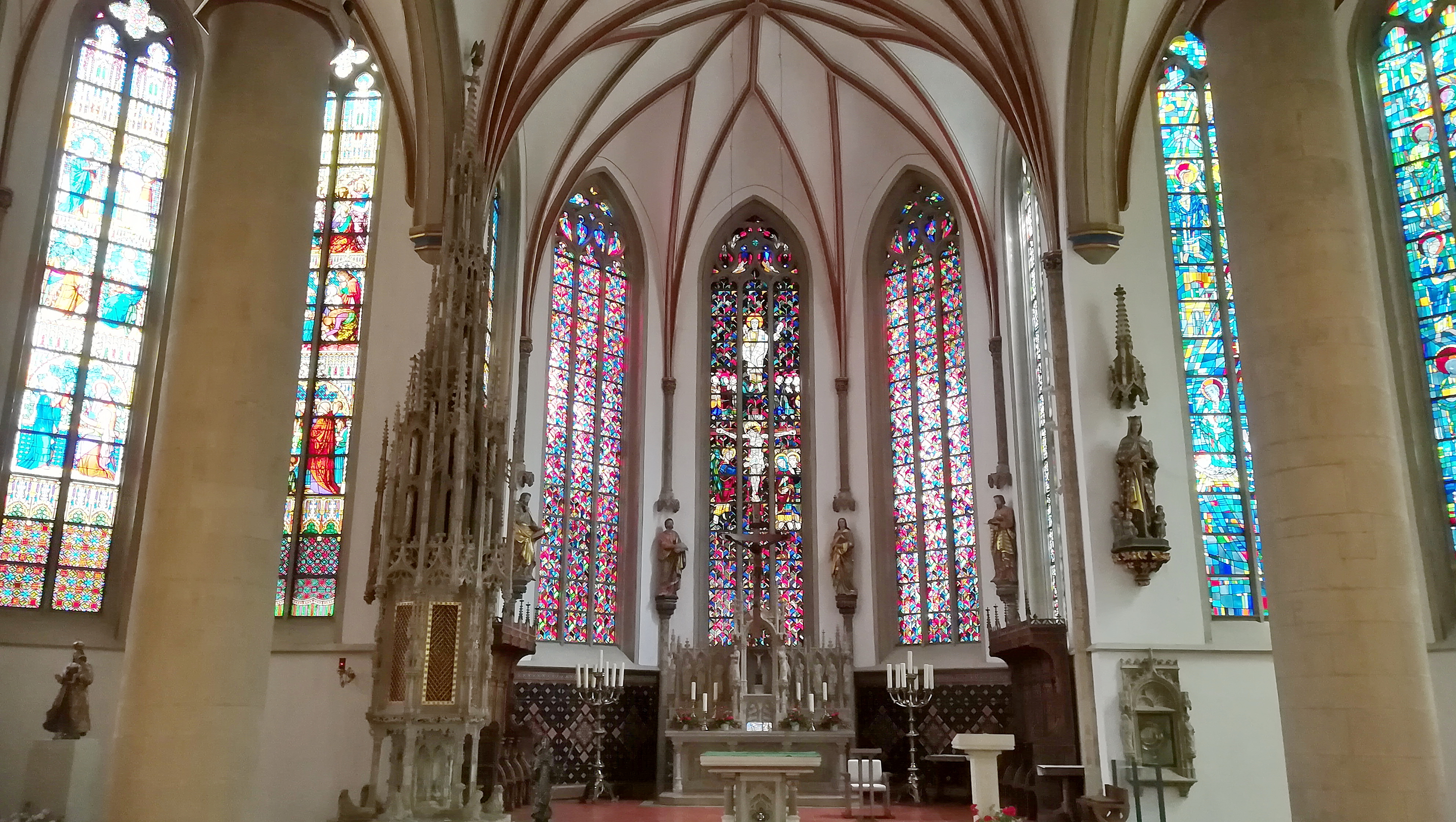 St. Felizitas ist die katholische Pfarrkirche im Zentrum der Stadt Lüdinghausen